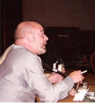 Gil de Biedma, en el Aula Magna de la Universidad de Barcelona